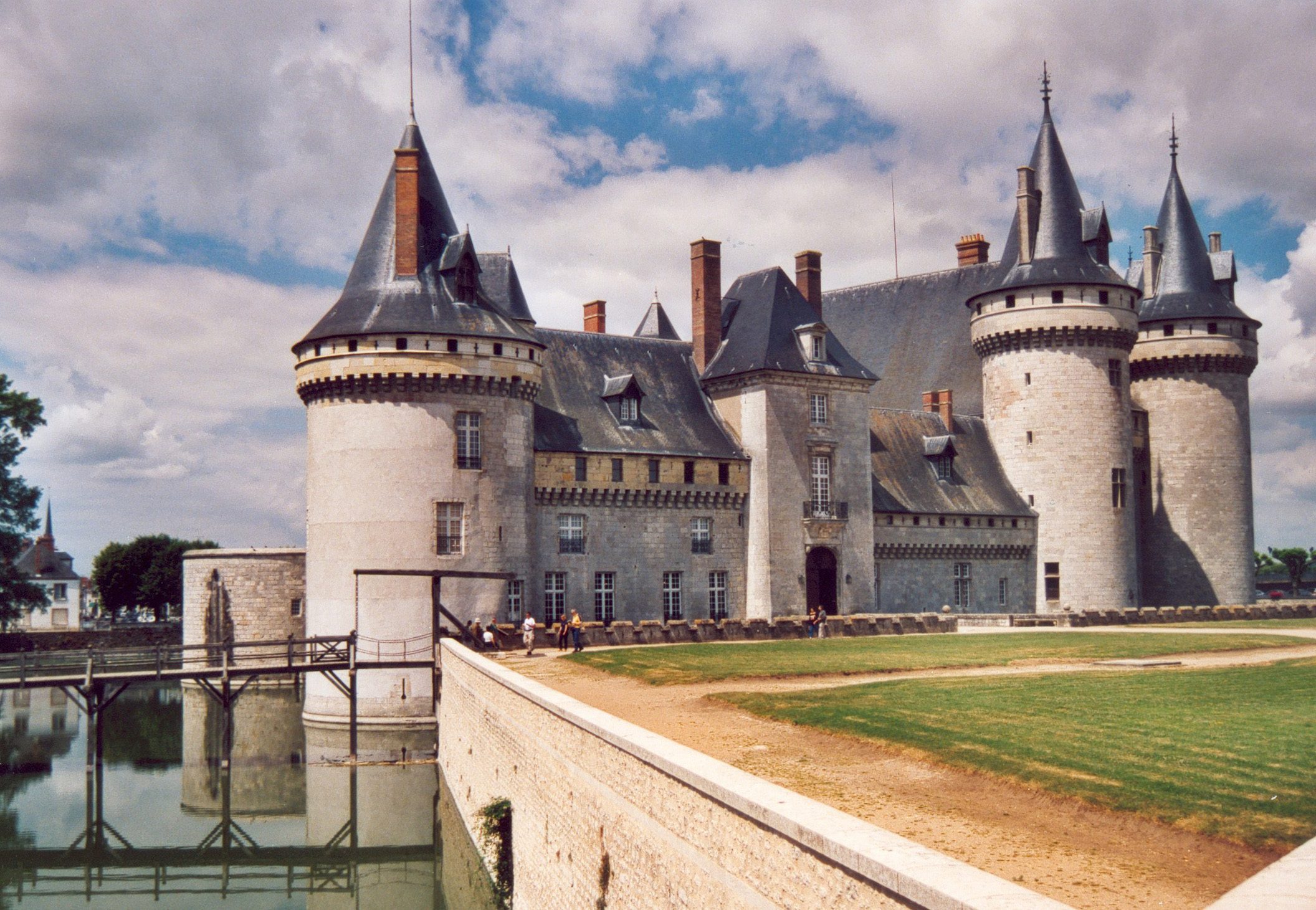 France Loiret Sully-sur-Loire Le château